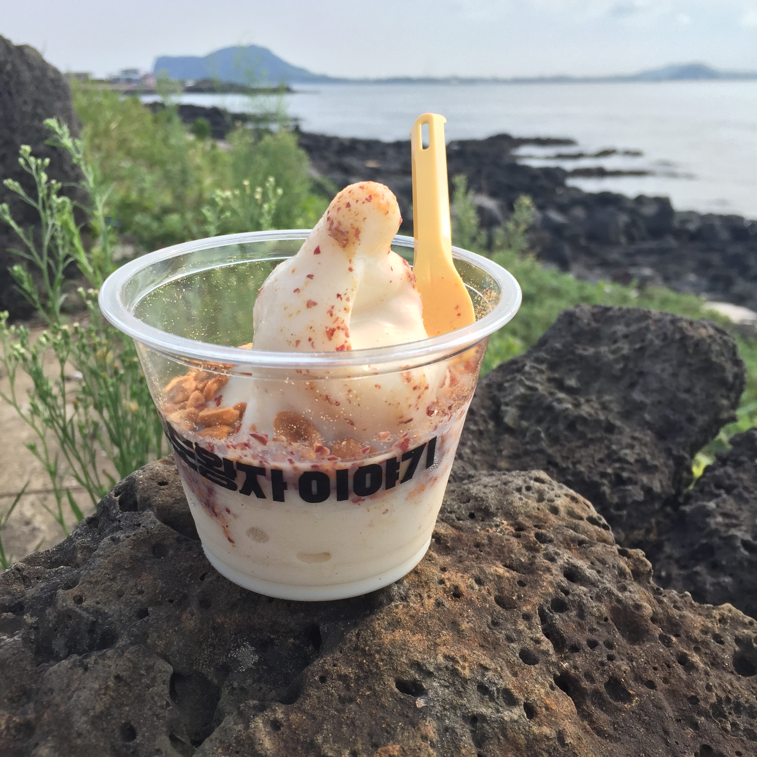 우도 땅콩아이스크림